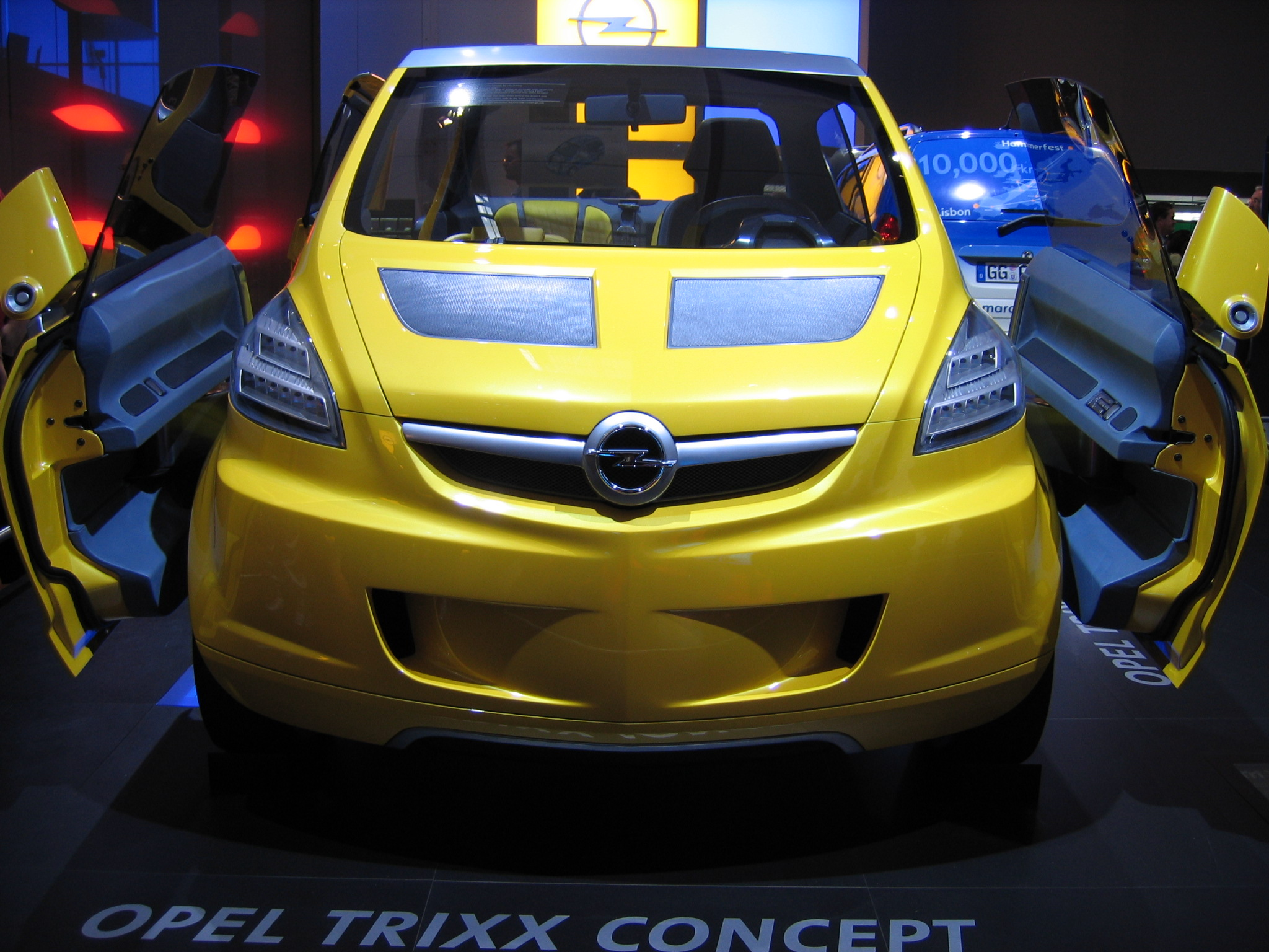 Opel Trixx (Parijs 2004). Eigen werk, PD.